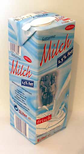 Bild einer typischen Tetrapak Verpackung (Tetra Brik).